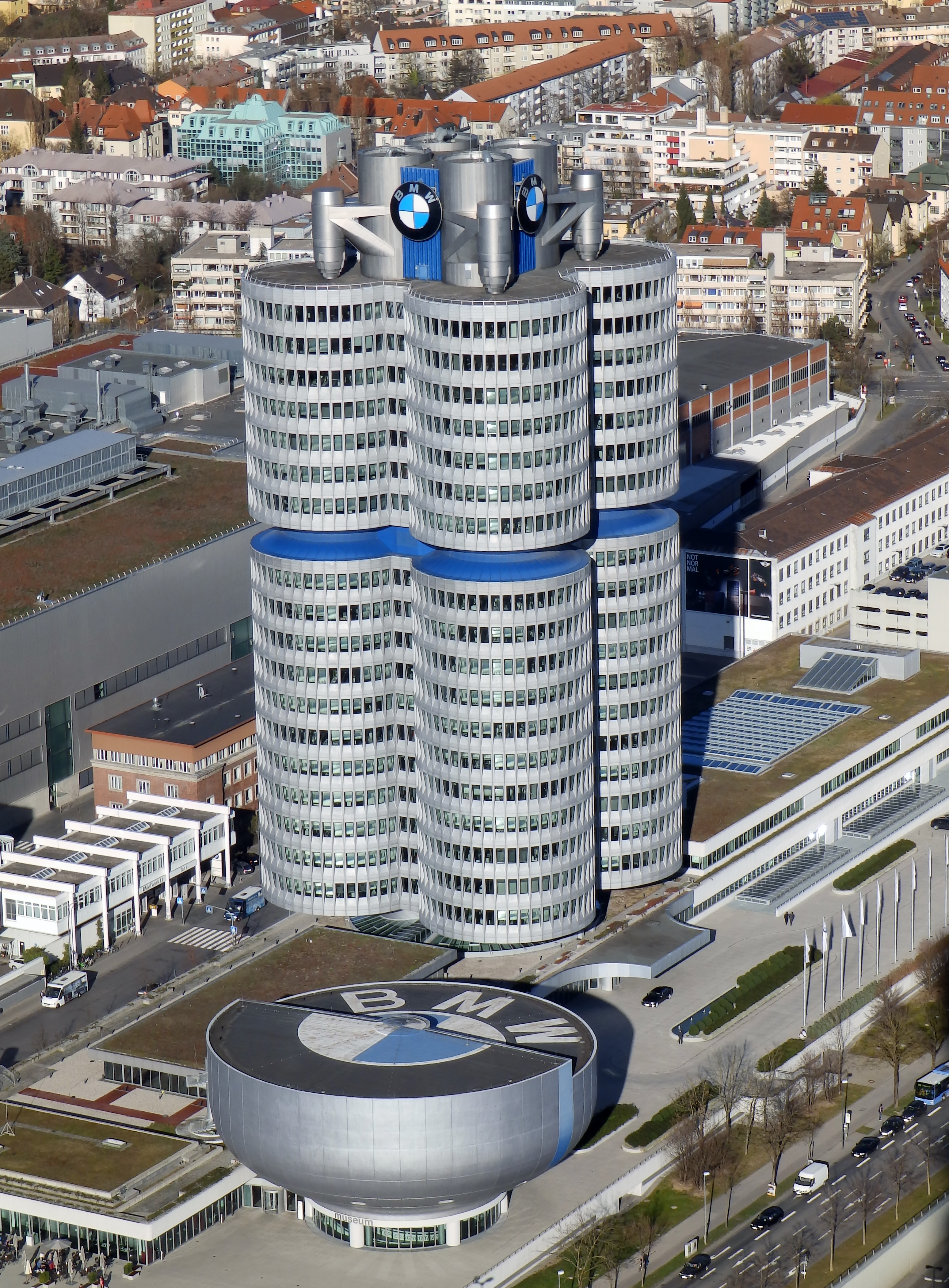 BMW Museum